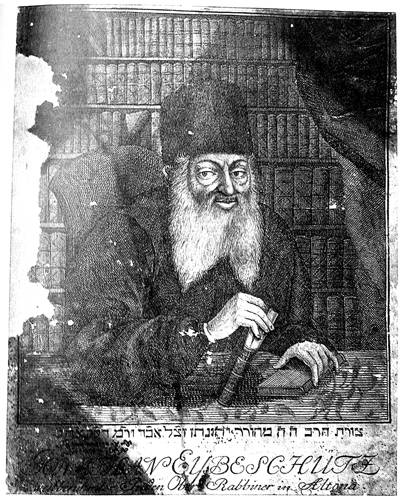 Postumer Kupferstich von Jonathan Eybeschütz (1690-1767).